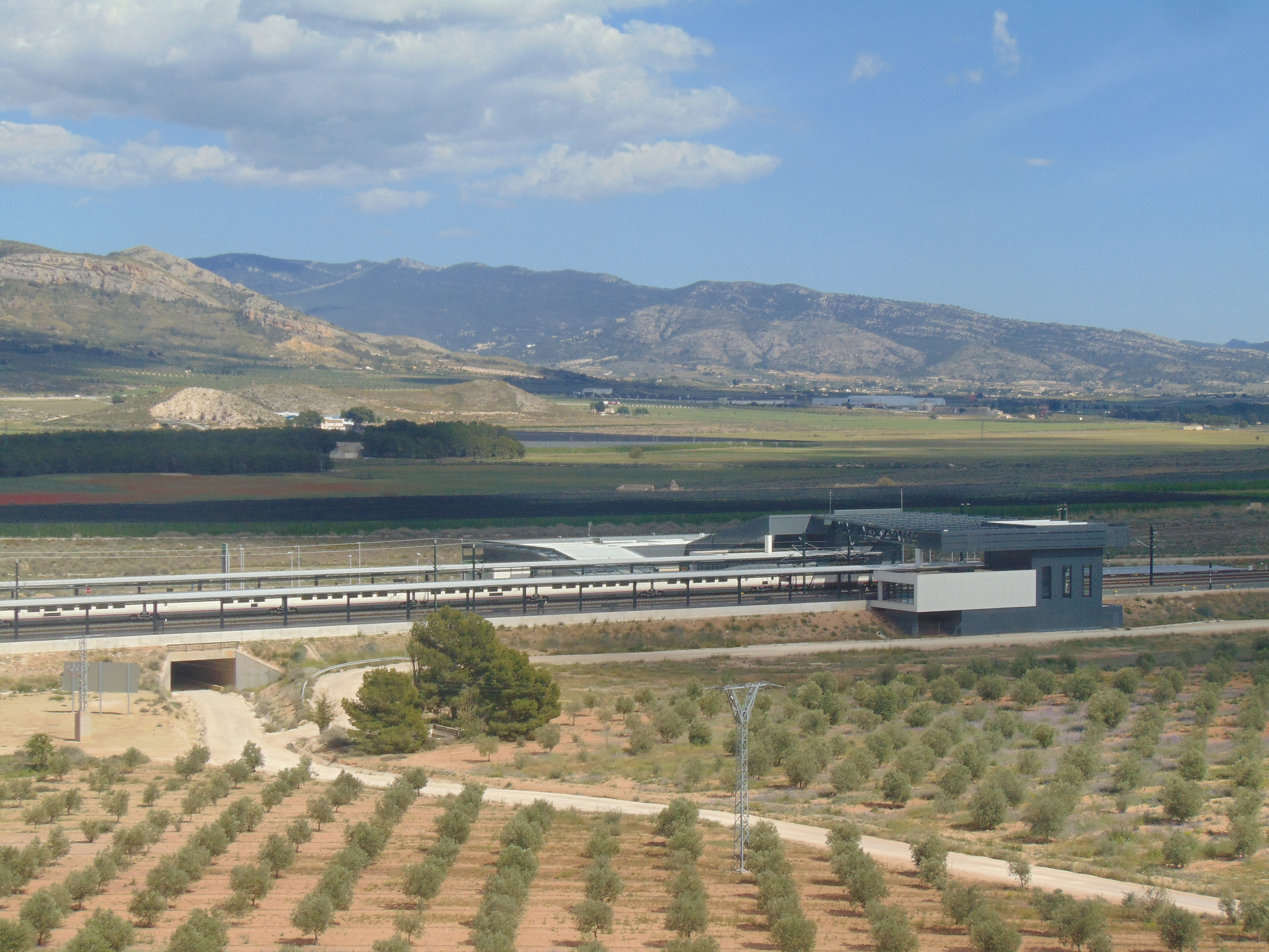 vista a la la estacion AVE de Villena